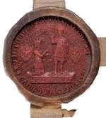 Pečeť Univerzity Karlovy v Praze